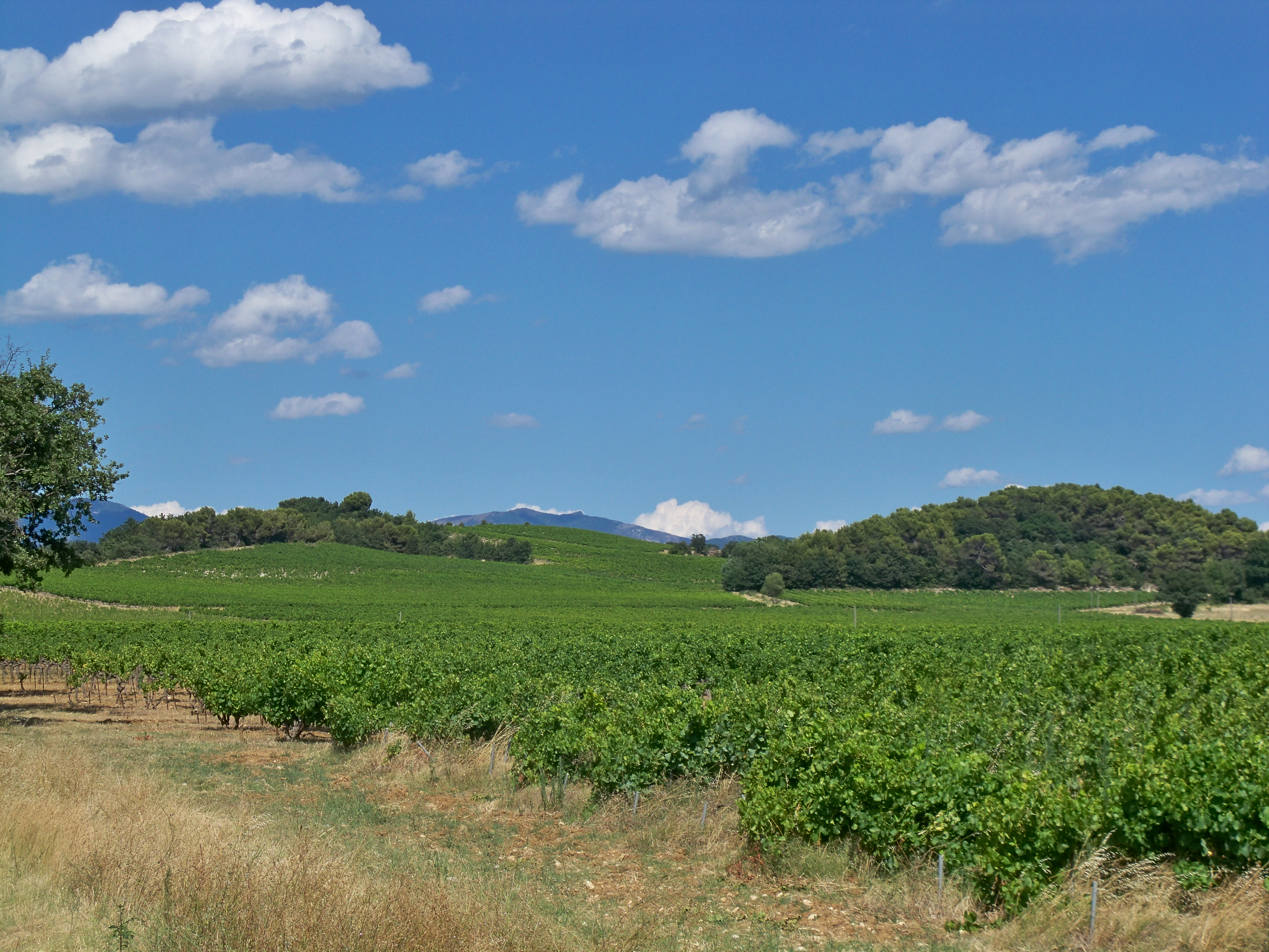 Coteaux de vignes à Saint Pantaléon, Drôme, France